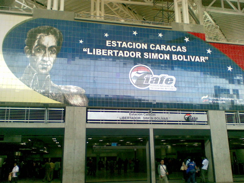 Estacion Caracas "Libertador Simón Bolívar" del Sistema Ferroviario Nacional tramo Caracas-Cua